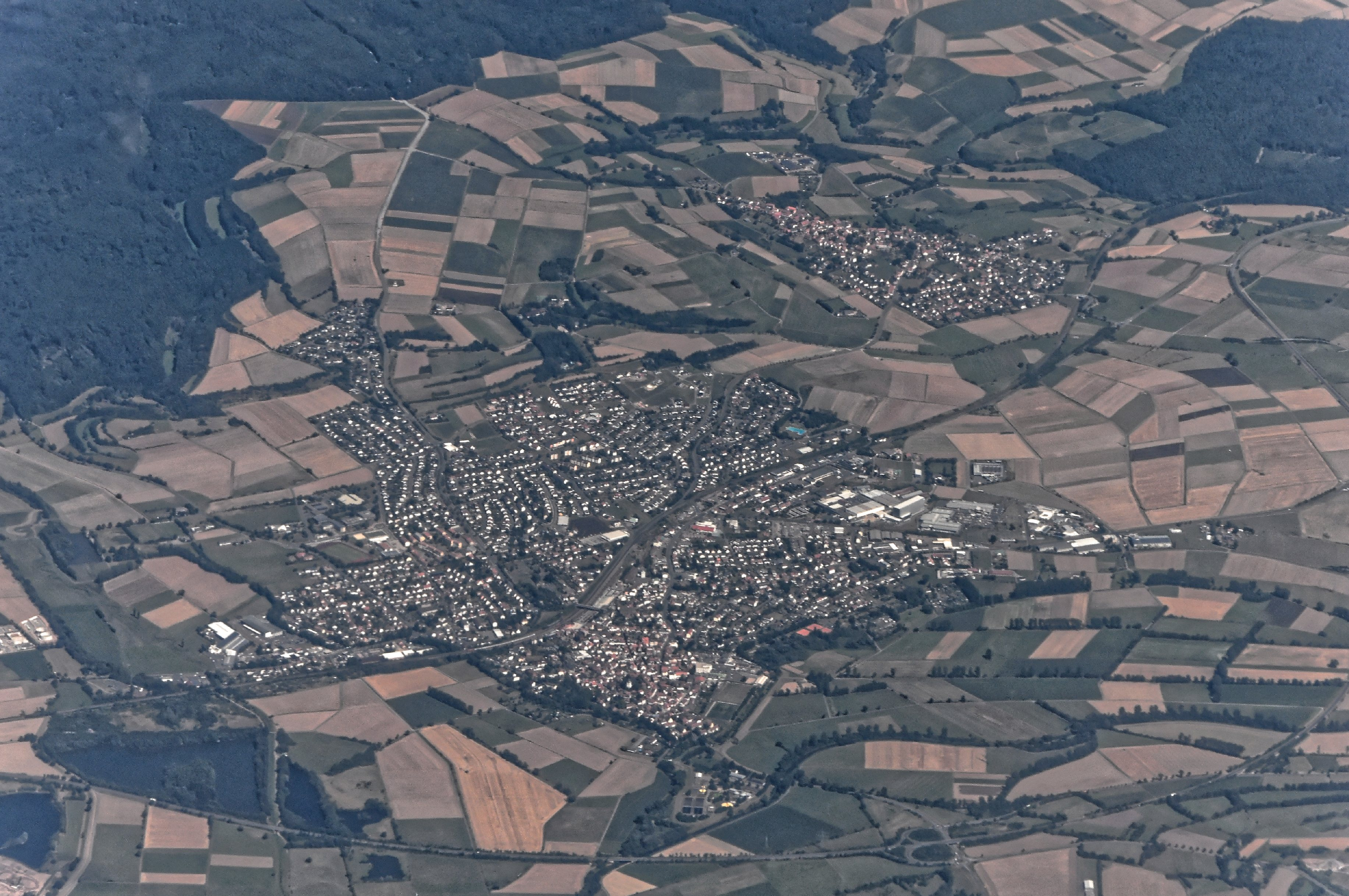 Bilder vom Flug -Rom-Düsseldorf-Hamburg 2013: Kirchhain Dieses Foto entstand in Zusammenarbeit mit Stadtbesichtigungen.de Die Seiten Stadtbesichtigungen.de, der dazugehörige Reise Blog sowie die Facebookseite: Stadtbesichtigungen Rom dürfen dieses Bild für Ihre Veröffentlichungen ohne den Hinweis auf Wikipedia, Commons bzw der Lizenz verwenden. Die Verantwortlichen habe von mir (Ra Boe) die Originaldaten zur freien Verfügung übermittelt bekommen.